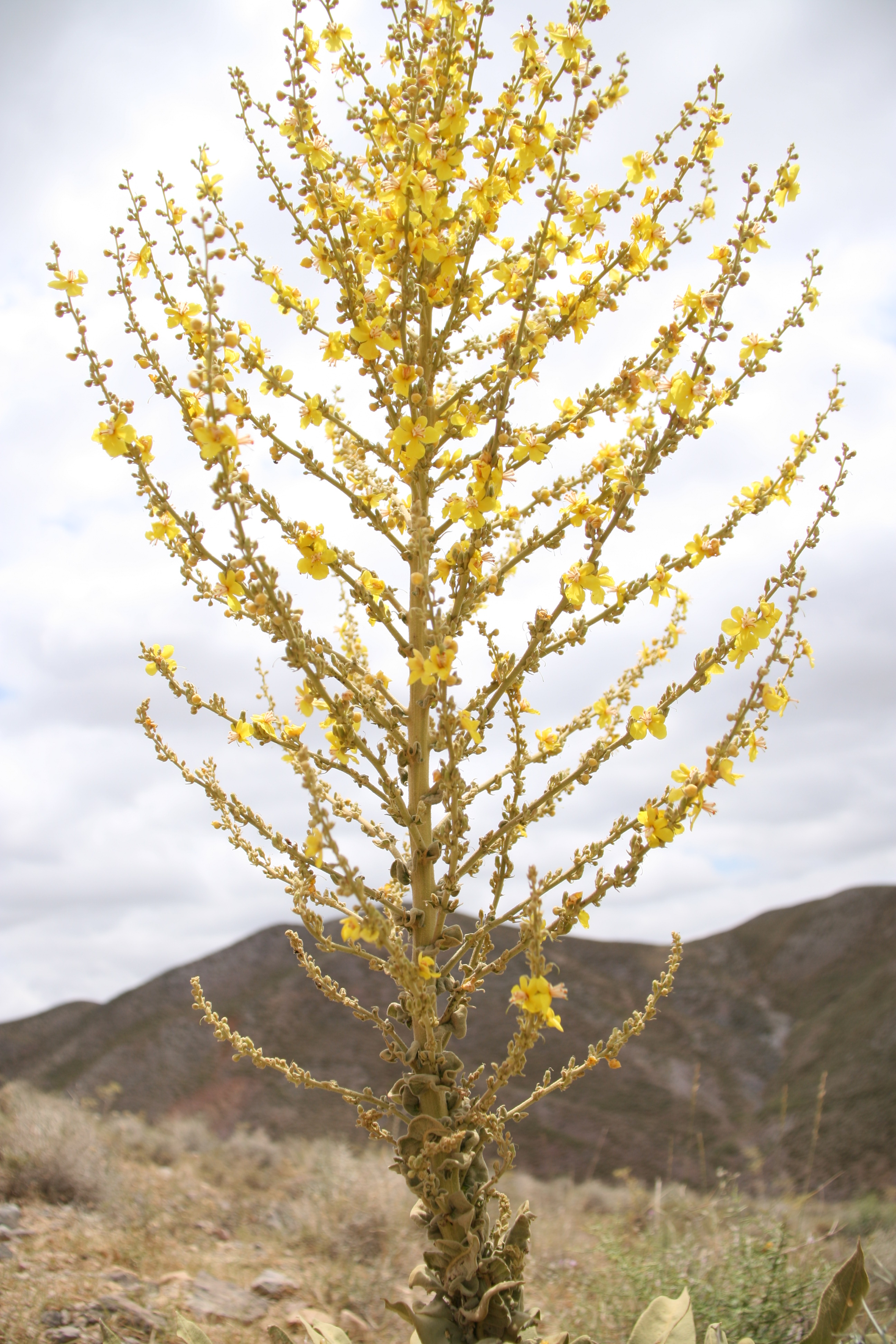 سیقرقوروقو از پوشش گیاهی روستای نوده گیاهان دارویی